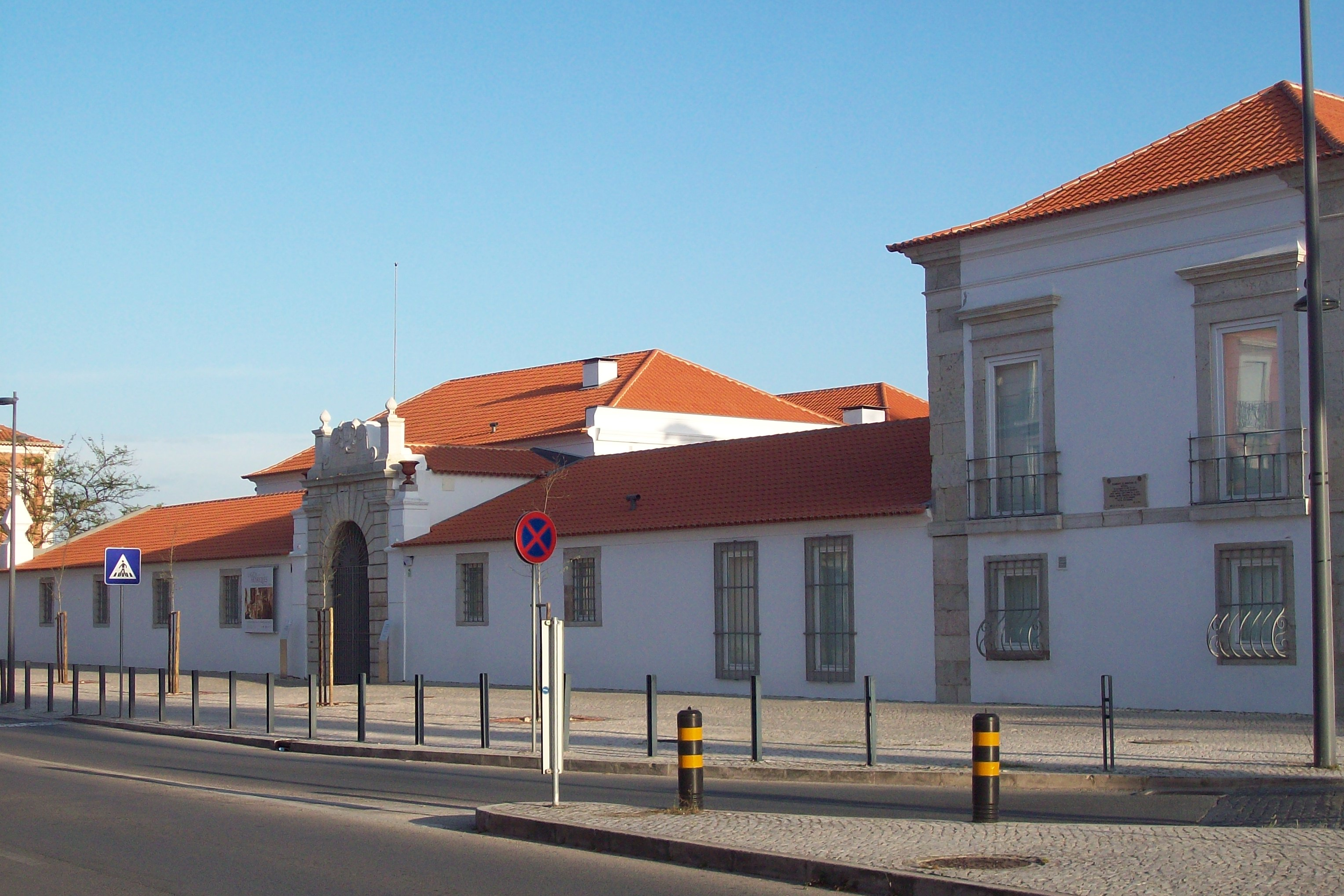 Quartel do 11 - Av. Luísa Todi - Setúbal